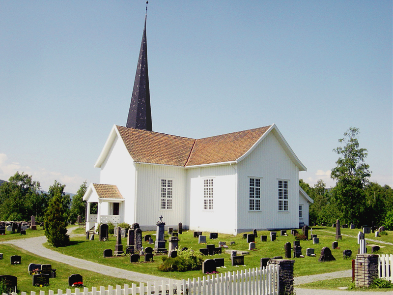 Fluberg kirke, in Søndre Land